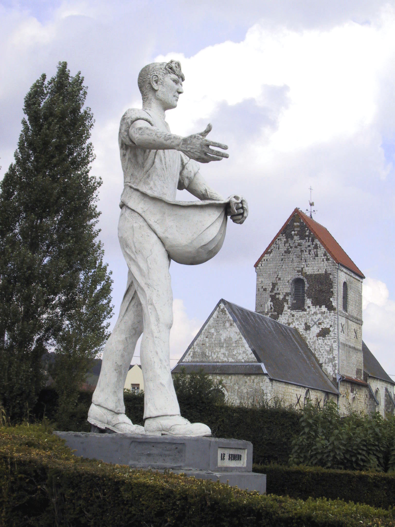 Le semeur de Clerques, sculpteur Harry Covemaecker